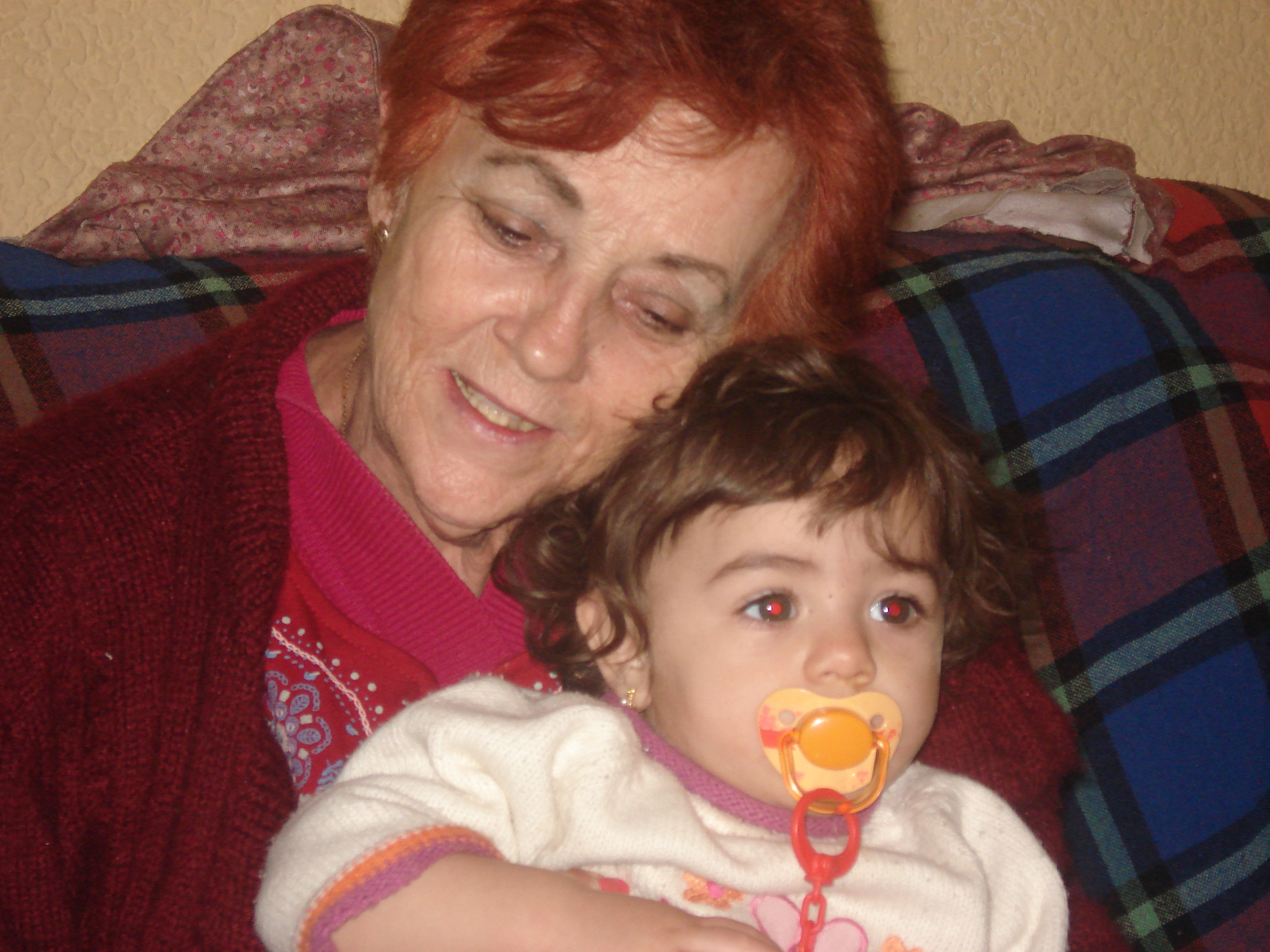 fotografia de carmen borja